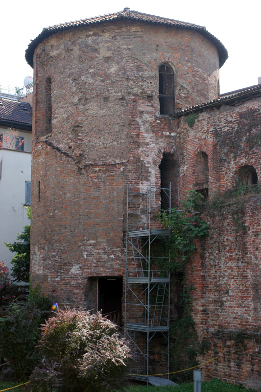 Torre superstite delle mura romane fatte costruire dall'imperatore Massimiano a Milano (sec. III d.C.), nel cortile del Museo archeologico di Milano.